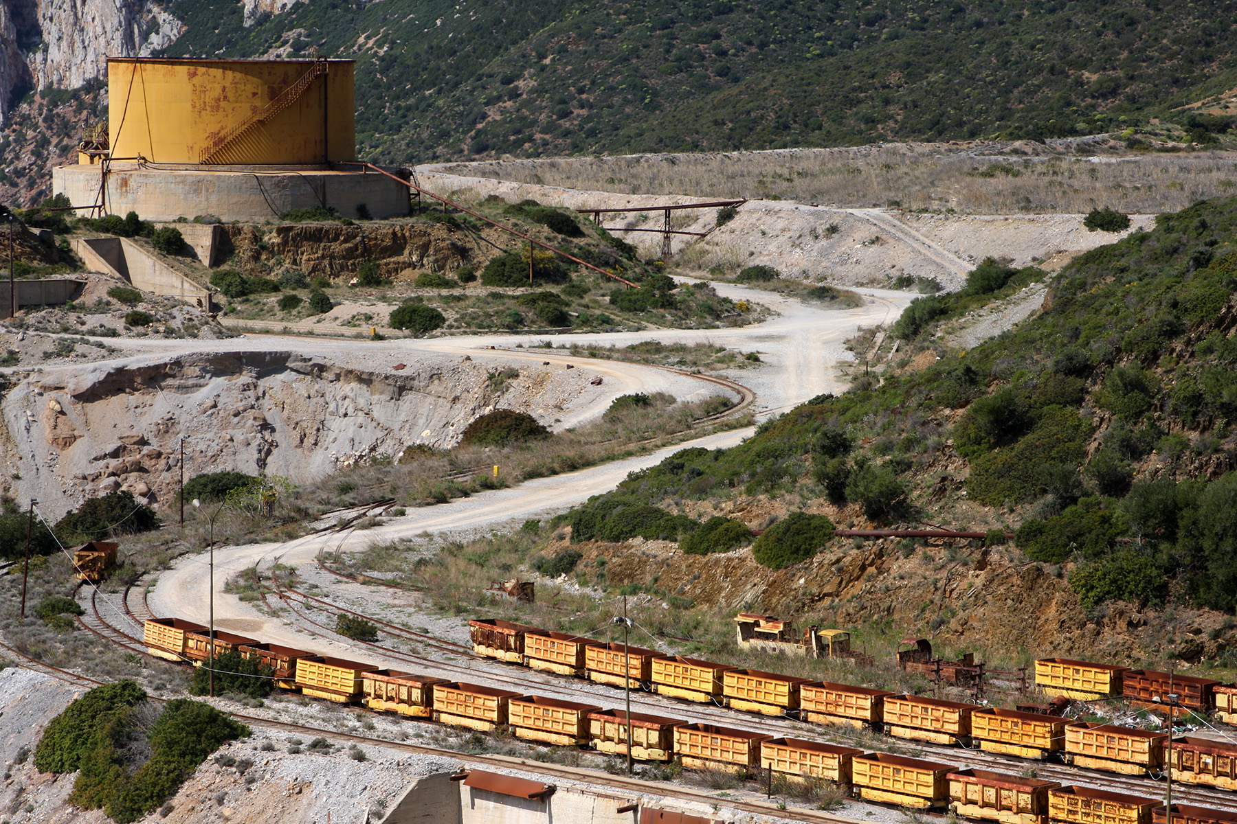 Iglesias (CI)